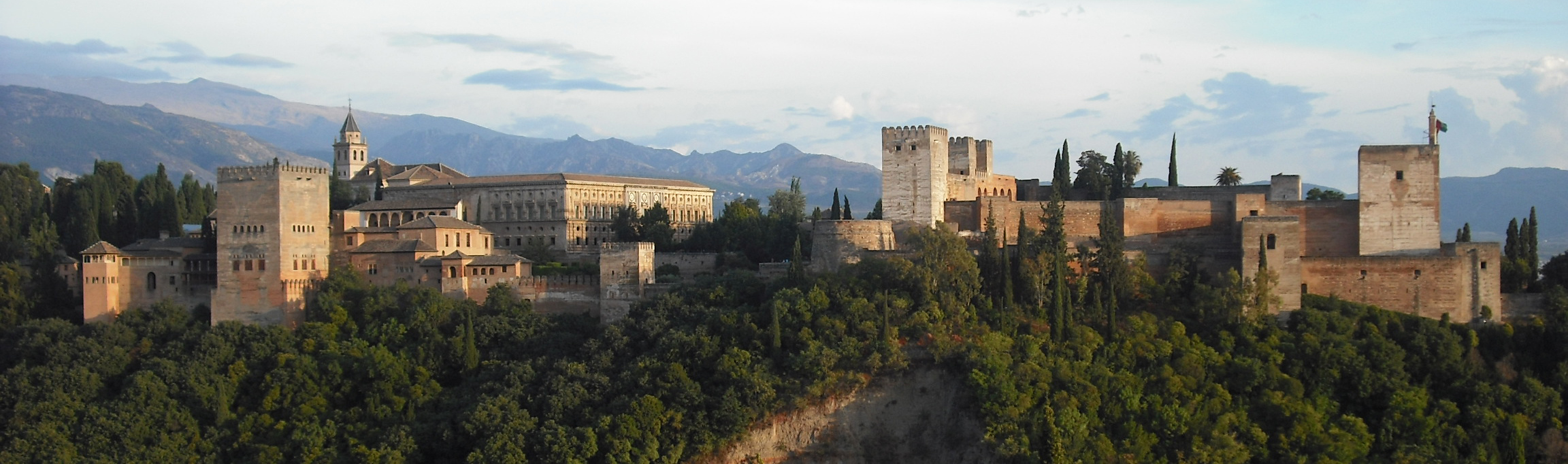 Tomada por Jorge Gutiérrez (España).